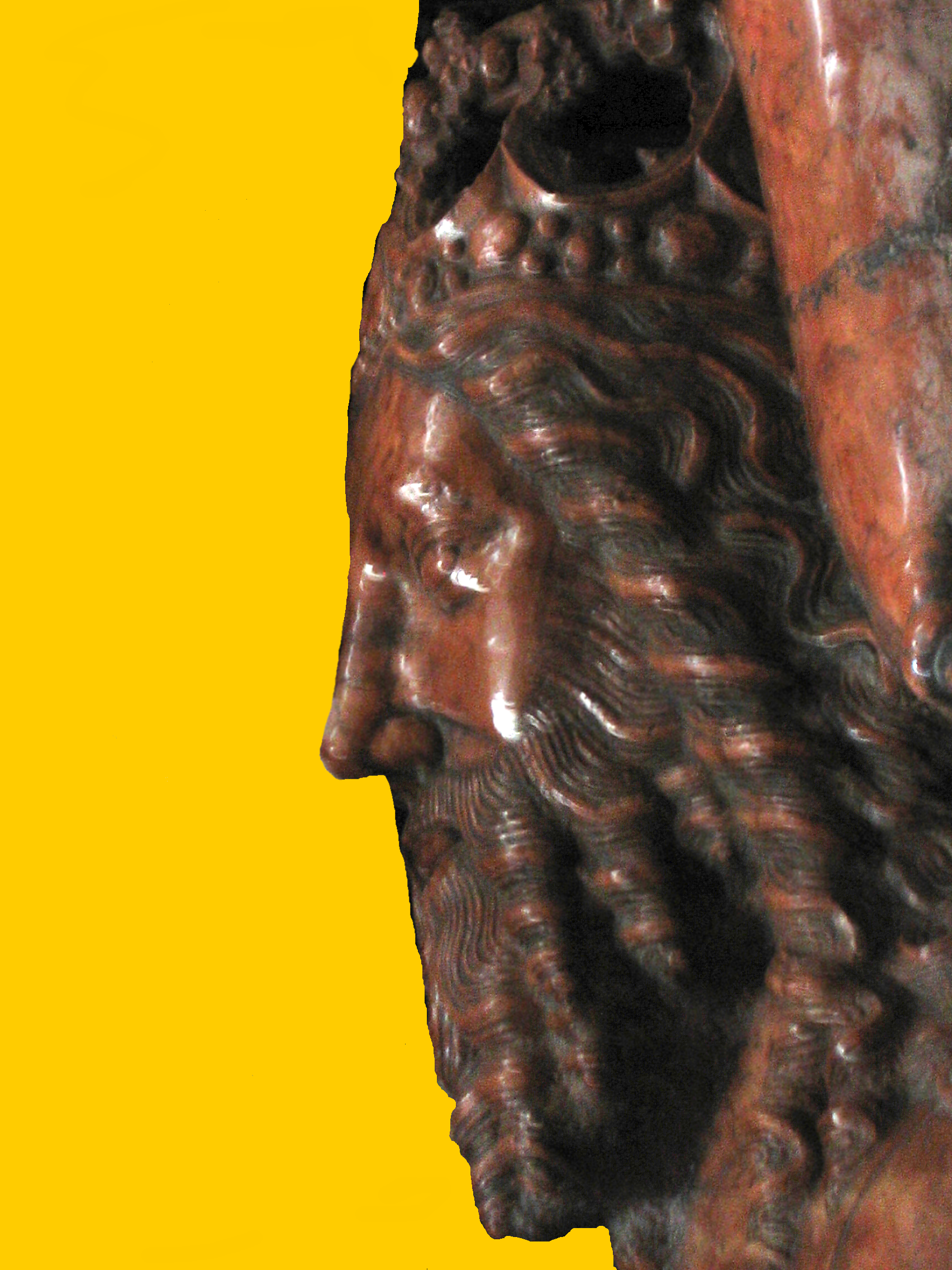 Tomb effigy of Polish king Kazimierz III Wielki in Wawel Cathedral photo by: User:Mathiasrex Maciej Szczepańczyk